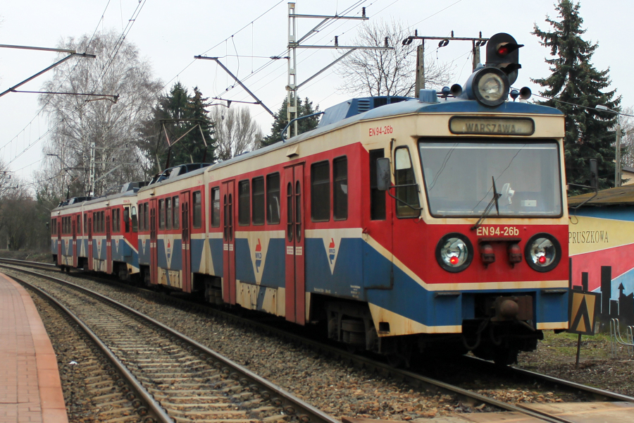 Skład elektrycznych zespołów trakcyjnych EN94-23+26 odjechał z przystanku Malichy w kierunku stacji Warszawa Śródmieście WKD jako pociąg WKD 306.